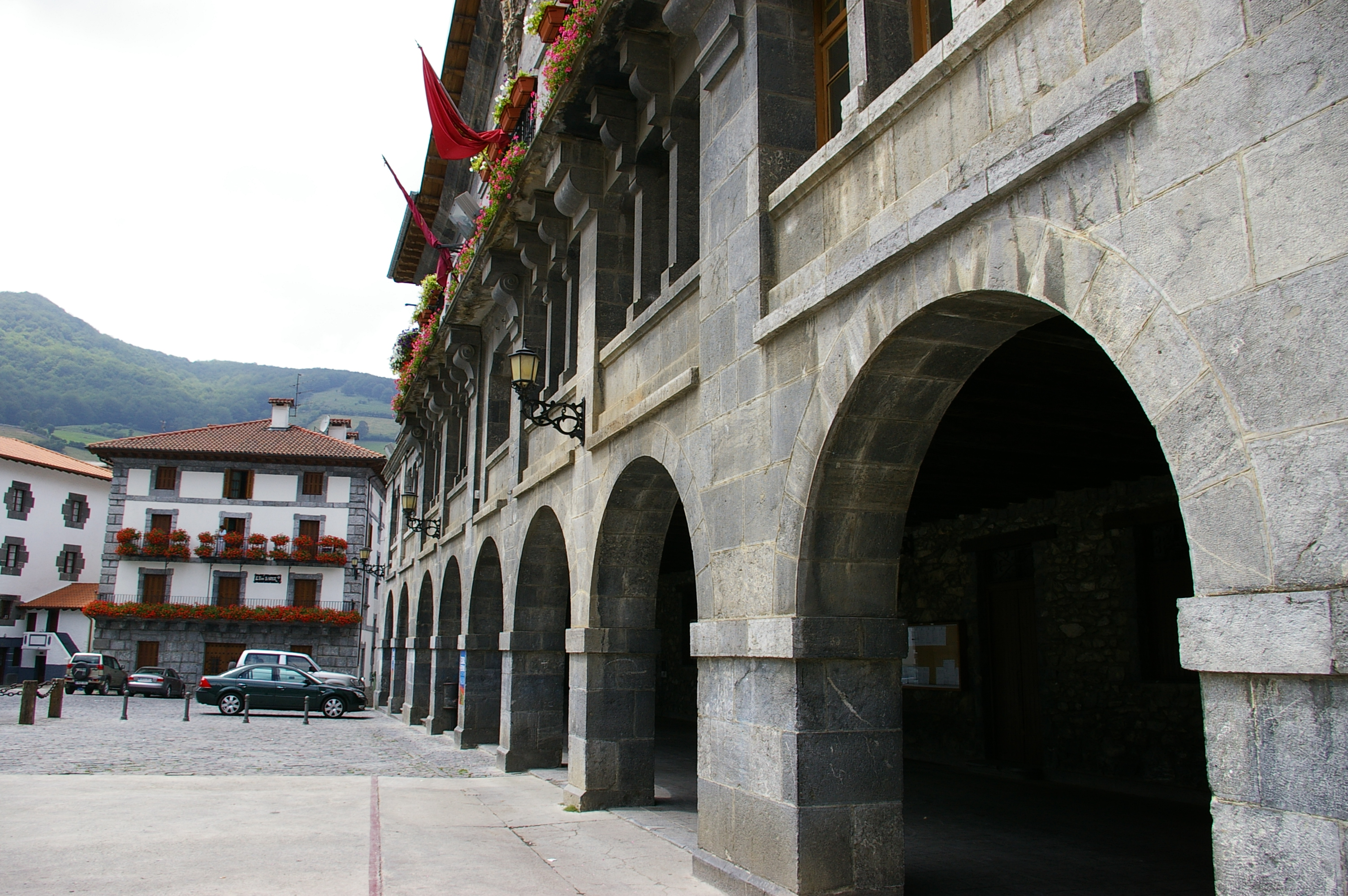 Leitzako udaletxea. Nafarroa, Euskal Herria.